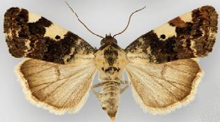 Tarache aprica female